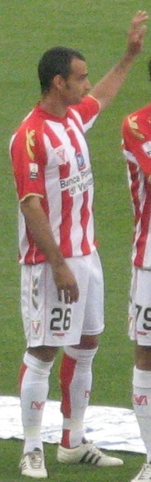 Squadra del Vicenza Calcio. Da sinistra: Gatton Gattoni, Alex Pinardi, Stefano Botta, Evans Soligo, Pasquale Maiorino, Nicholas Giani, Elvis Abbruscato, Nicolò Brighenti, Marco Pisano, Davide Gavazzi e Alberto Frison.